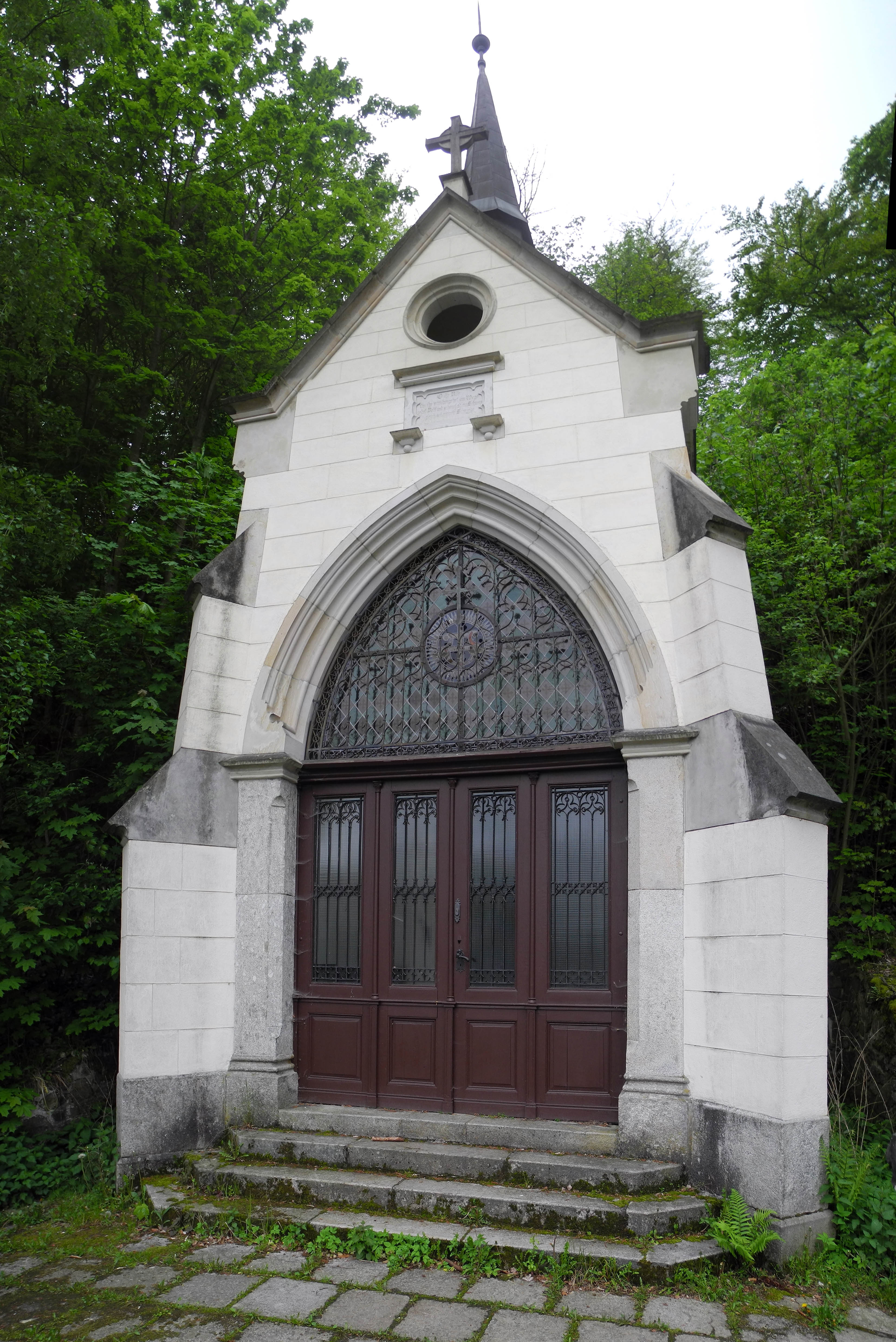 Marienkapelle hinter dem Hotel Pupp in Karlsbad - Karlovy Vary, Mariánská; neogotische Kapelle, errichtet 1885/86